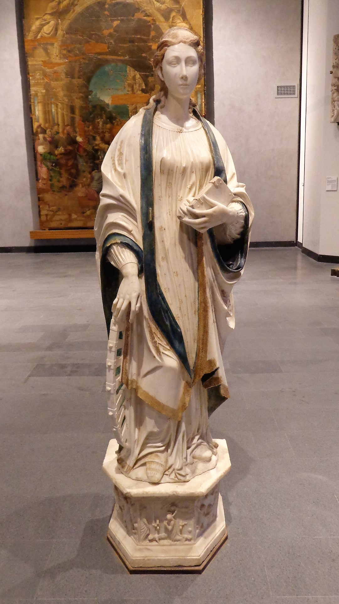 Santa Caterina d'Alessandria Mazzolo proveniente da Santa Lucia del Mela